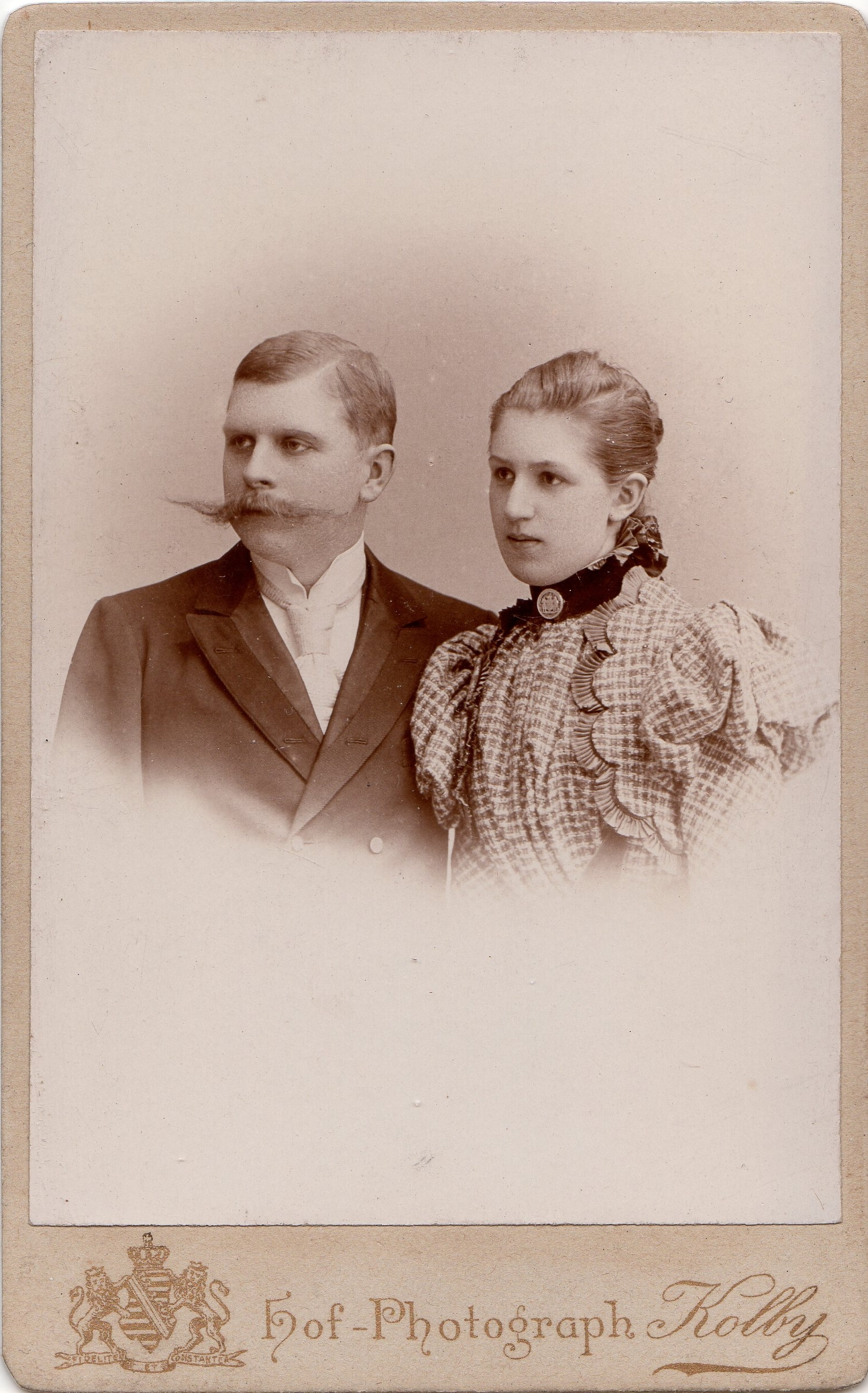 Albert Borchers mit seiner Frau Antoniette Richter